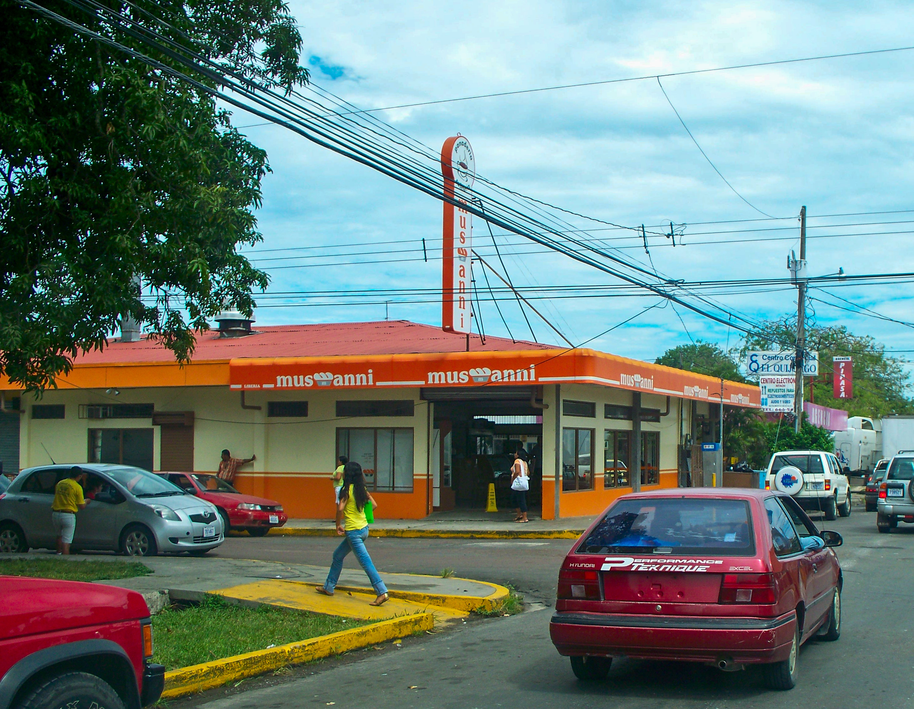 Una pandería de Musmanni en Liberia Guanacaste Costa Rica